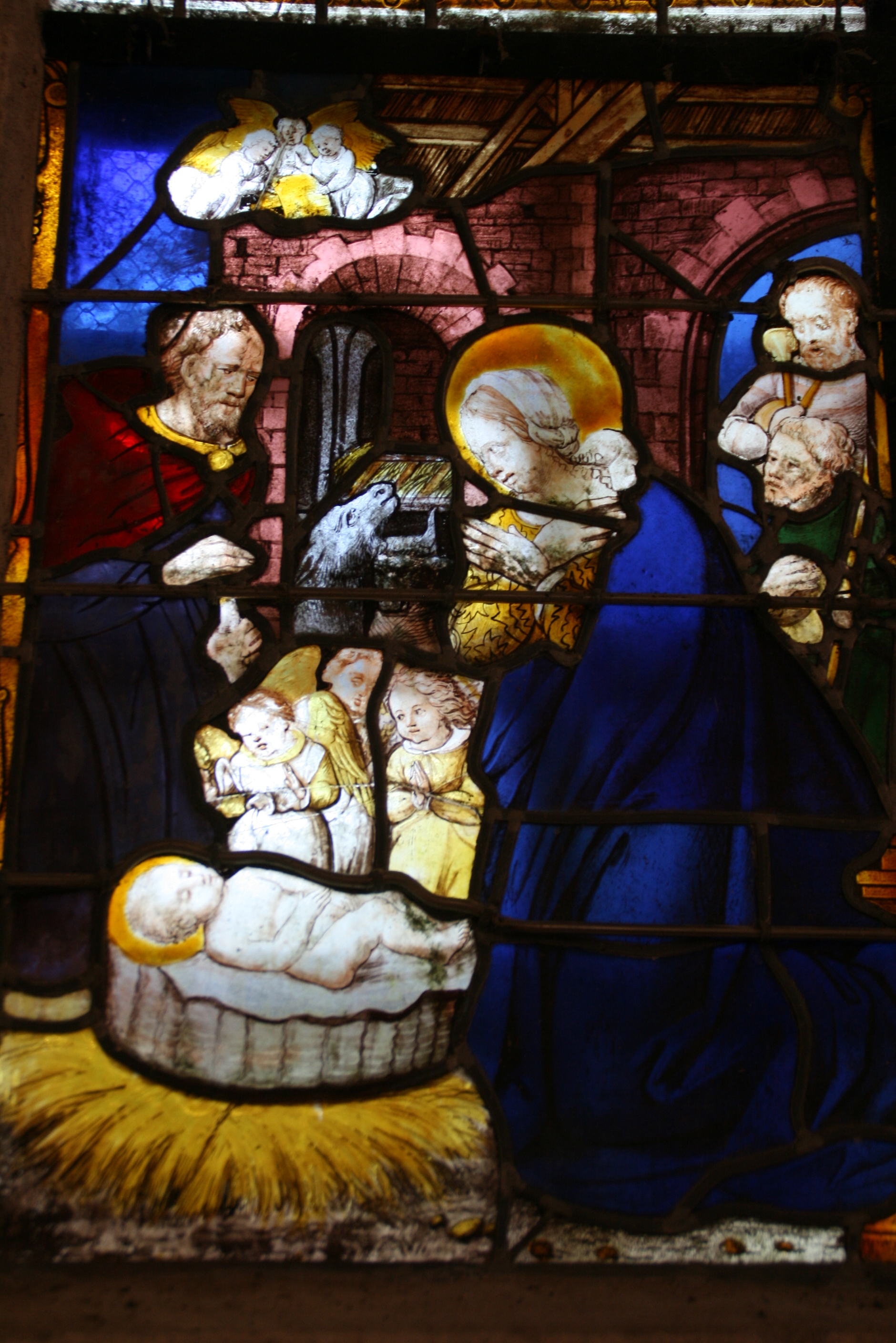 Scène de la Nativité dans la chapelle de Les Iffs